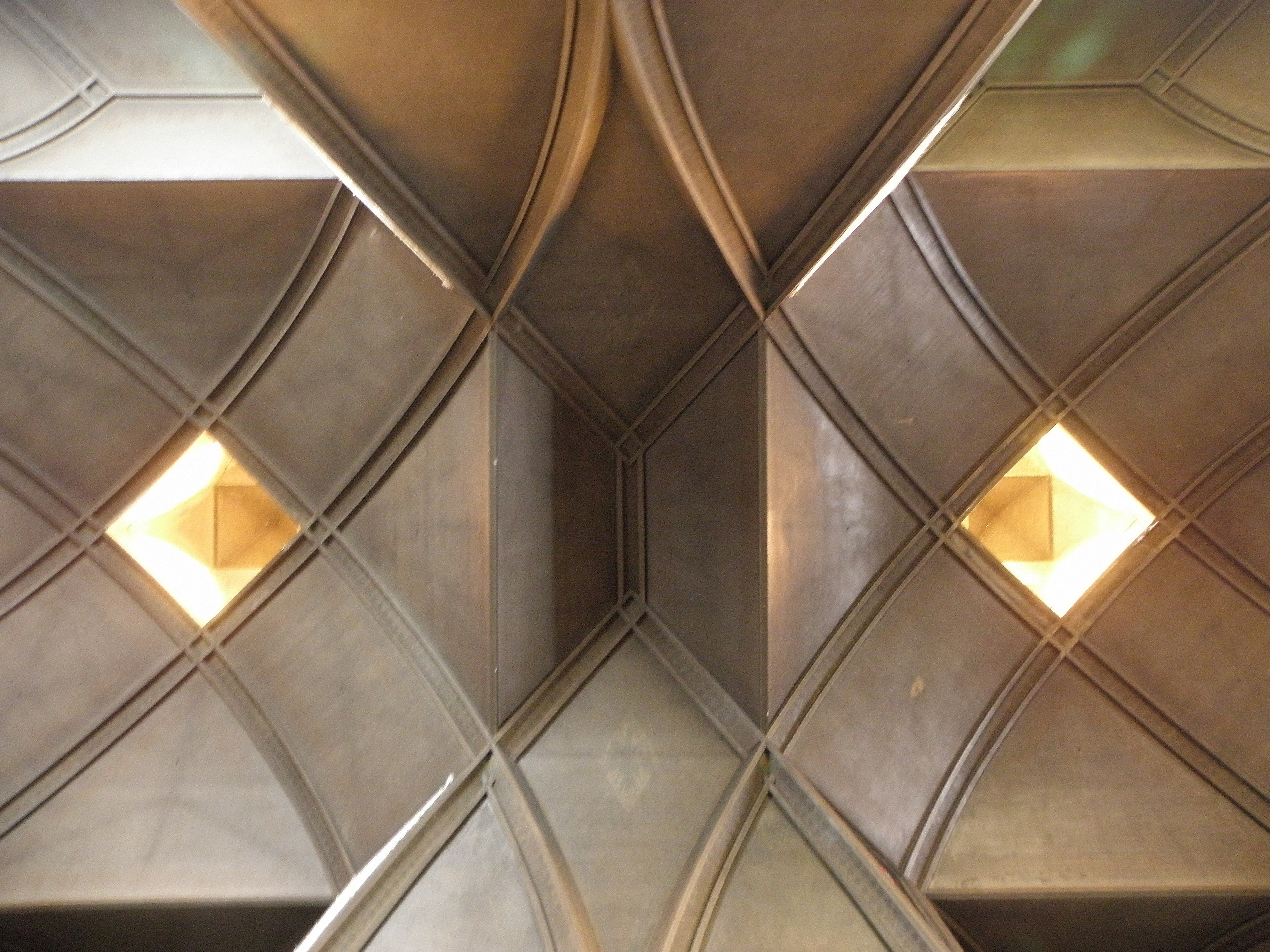 Voûtes de l'église Saint-Jean de Montmartre à Paris (75018). .